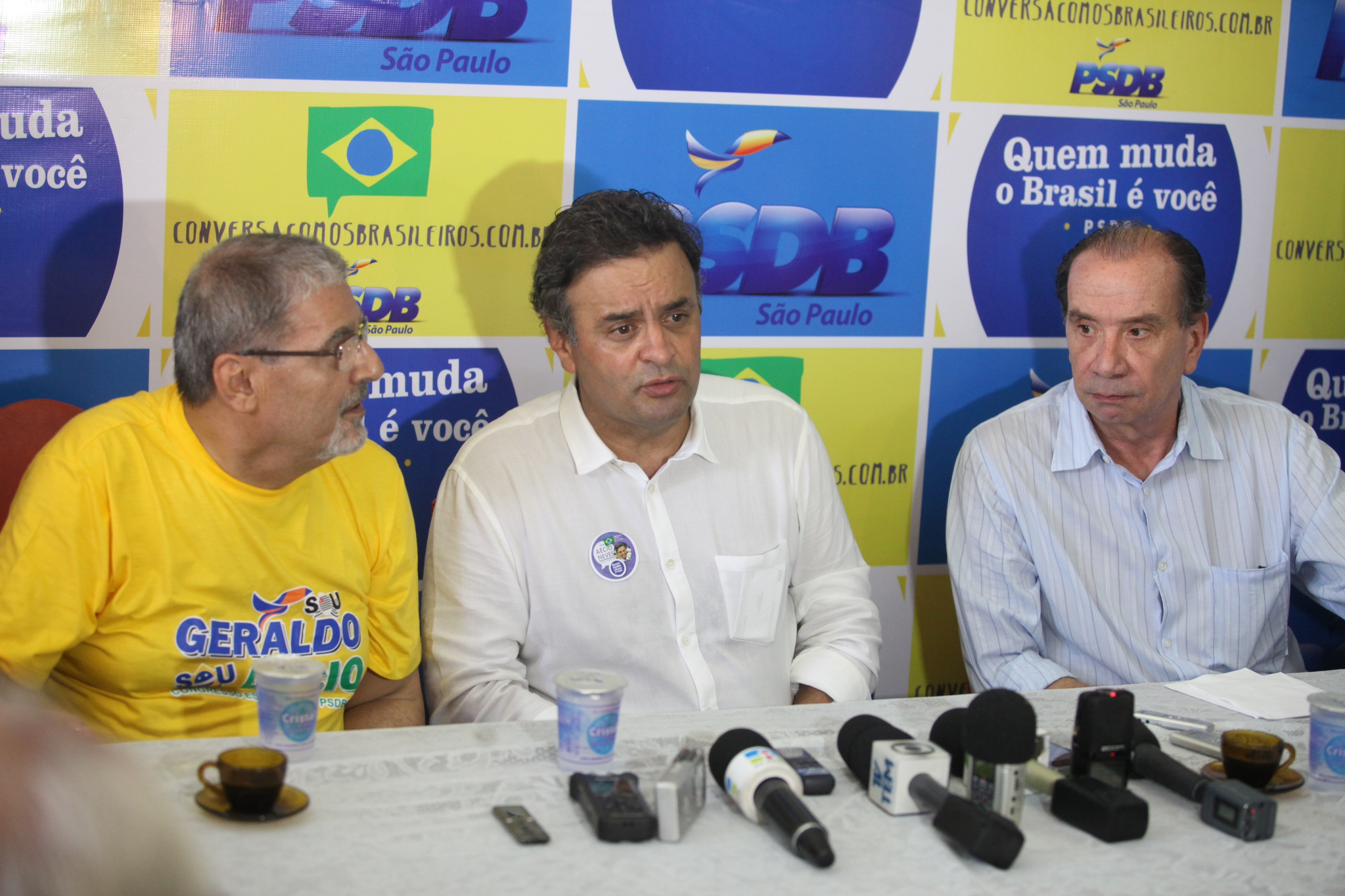 O presidente do PSDB, senador Aécio Neves, participa, neste sábado (30/11), de encontro com cerca de 1.200 pessoas em Bauru, interior de São Paulo. Acompanhado do líder do PSDB no Senado, senador Aloysio Nunes, do secretario de Energia de São Paulo, José Aníbal, e do deputado estadual Pedro Tobias, Aécio Neves reuniu-se com deputados, prefeitos, vereadores e lideranças da região. Foto: George Gianni